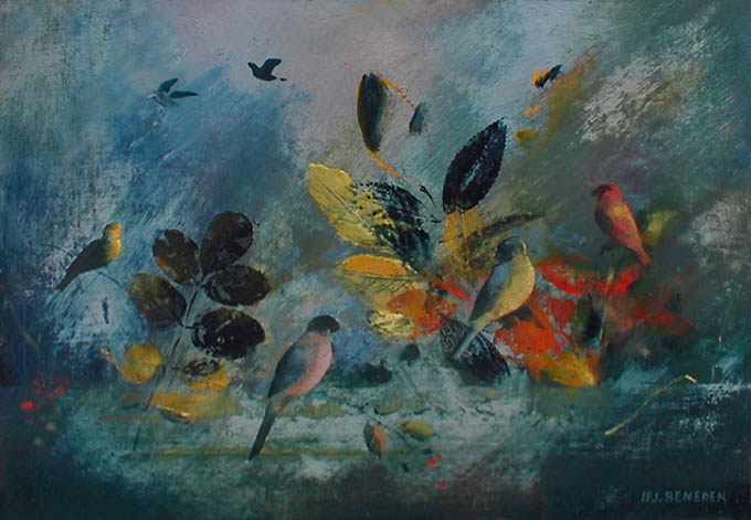 Benedek Jenő, ifj. (Csongrád, 1939. június 13.– 2019. augusztus 20.) festőművész alkotása: Madárkák, 2001, olajfestmény, 35x50 cm